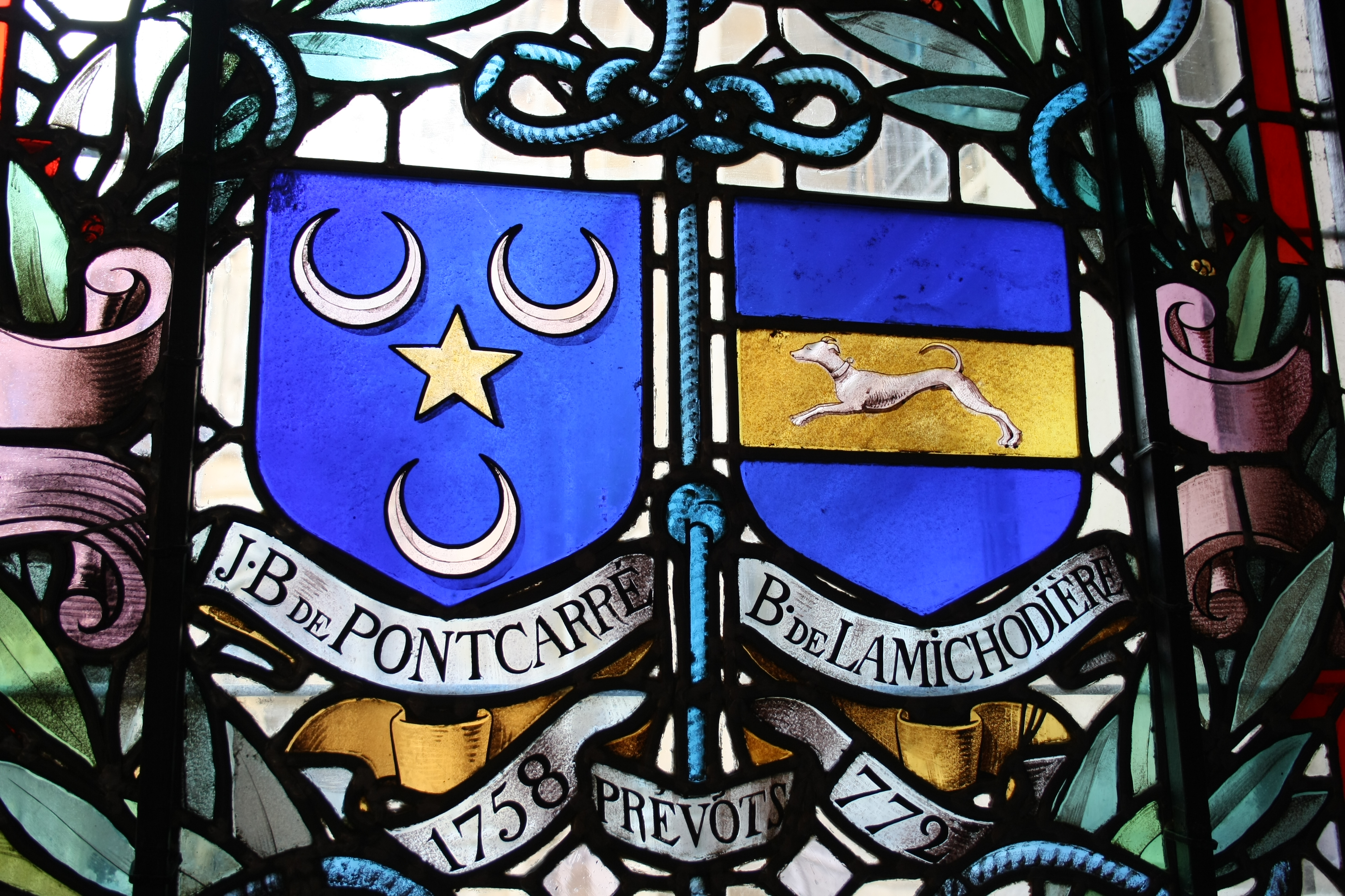 Bleiglasfenster im Rathaus von Paris (4. Arrondissement), "galerie du conseil", Darstellung: Wappen der Prévôt des marchands de Paris; Jean-Baptiste de Pontcarré de Viarmes (1758-1764) und Jean-Baptiste François de la Michodière (1772-1778)